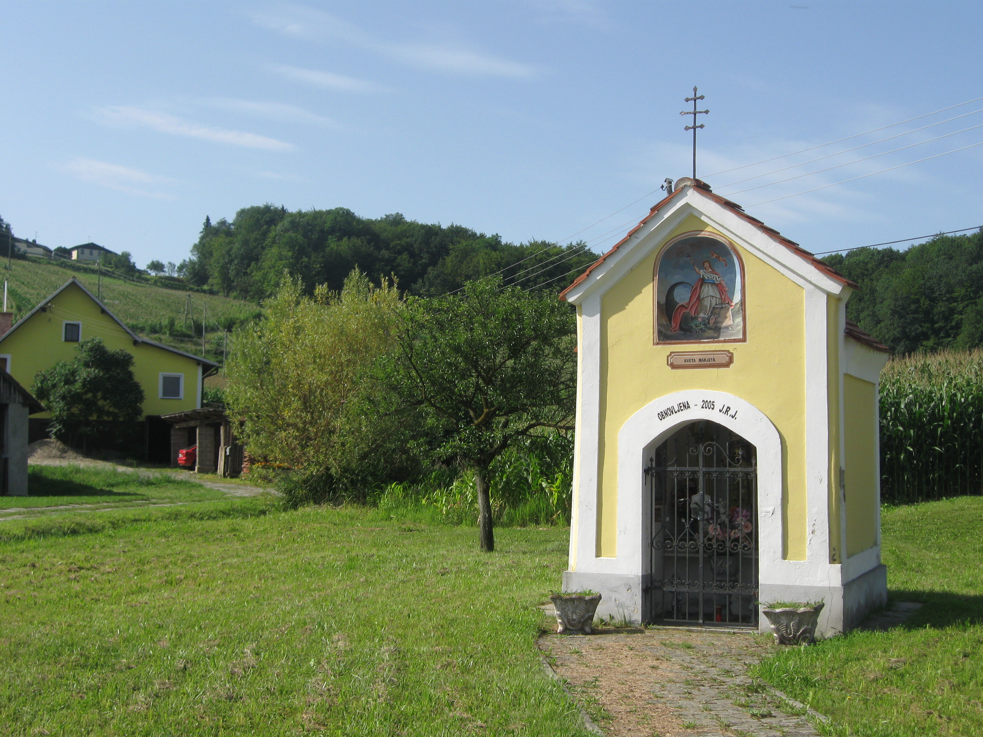 Kapelica v središču vasi Ložane v Občini Pesnica.